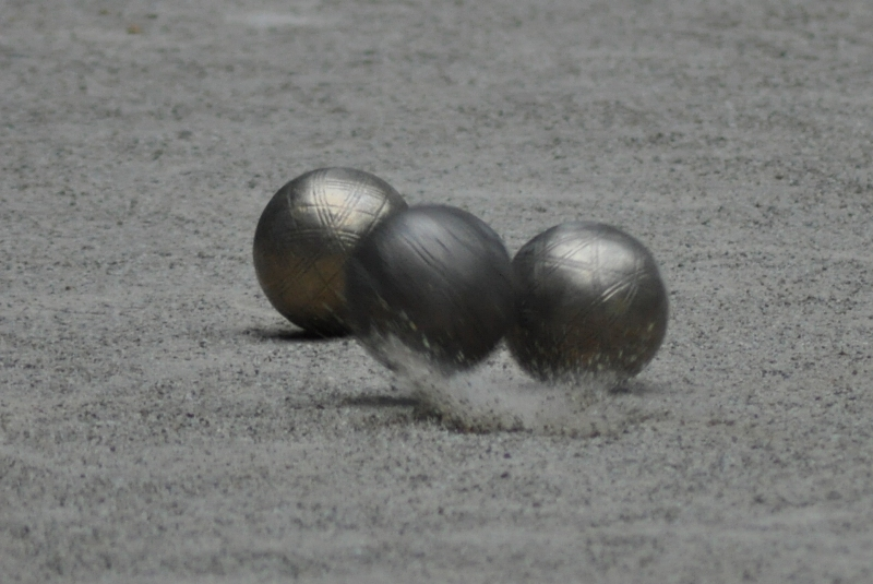 Balinanje.